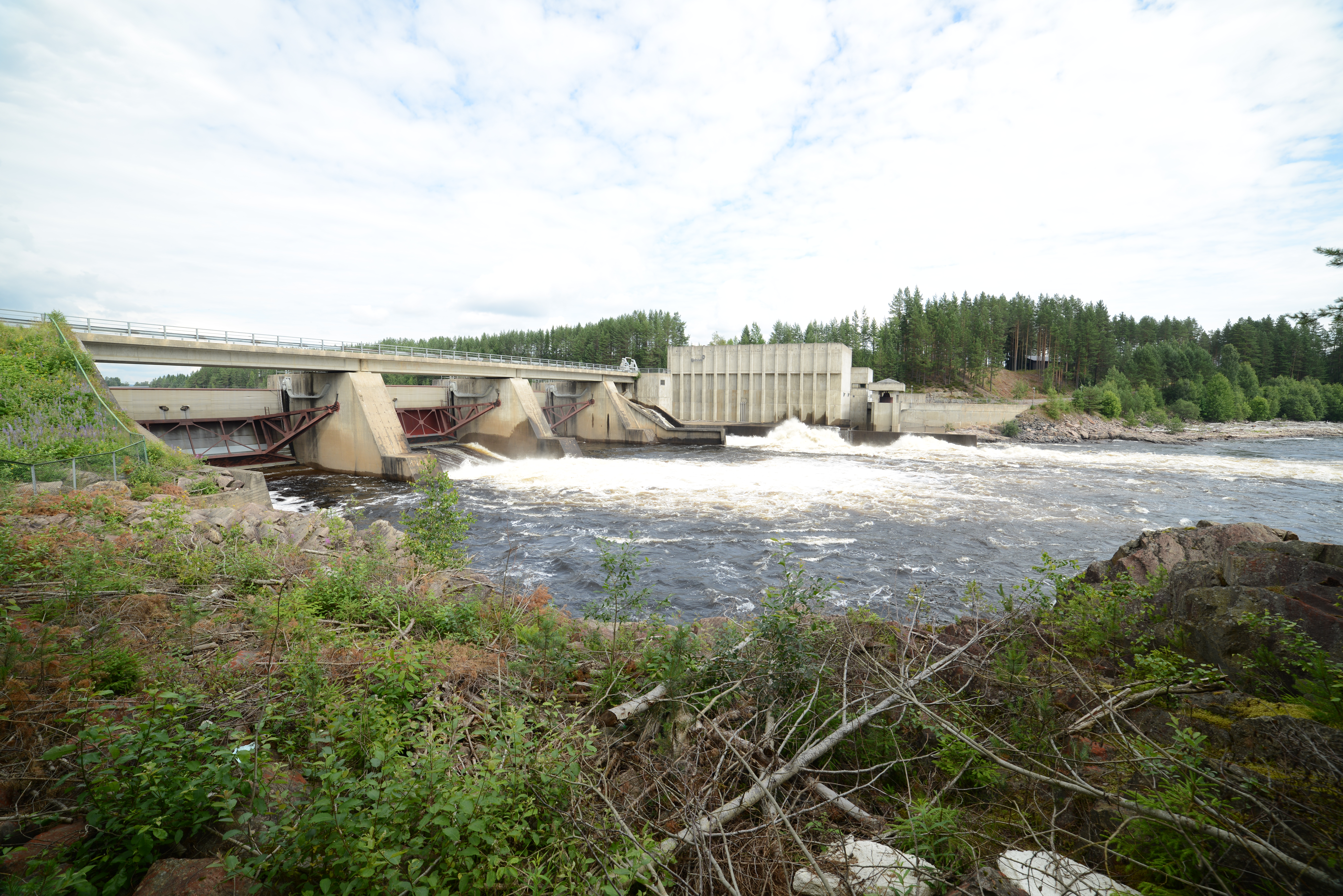 Braskereidfoss kraftverk